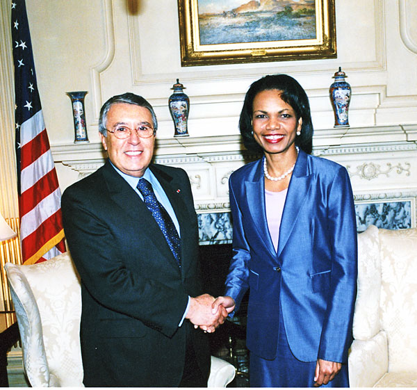 Mohamed Benaissa, ministre marocain des Affaires étrangères et Condoleezza Rice, secrétaire d'État des États-Unis.